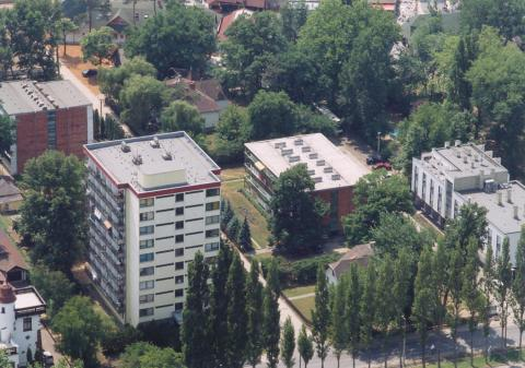 Balatonlelle, nyaralóépületek a fogas utca és a Napospart utca találkozásánál, Hungary, aerialphotgraphy